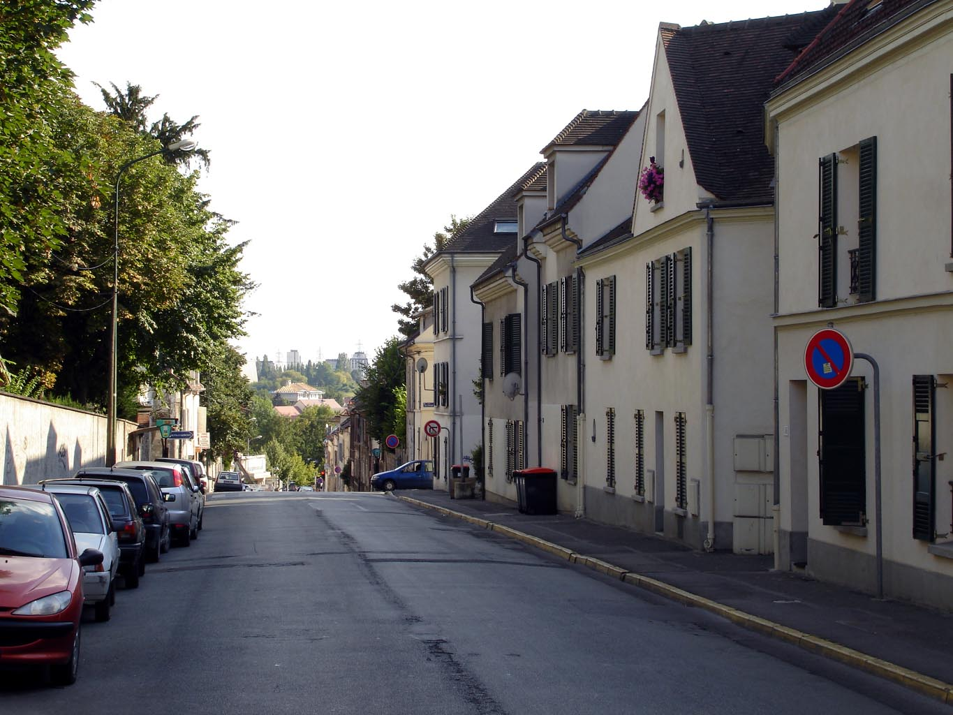 La rue Pierre-Brossolette à Sarcelles (Val-d'Oise), France Vue en direction du sud, au fond, le grand ensemble. Août 2007 Photo personnelle (own work) de Clicsouris